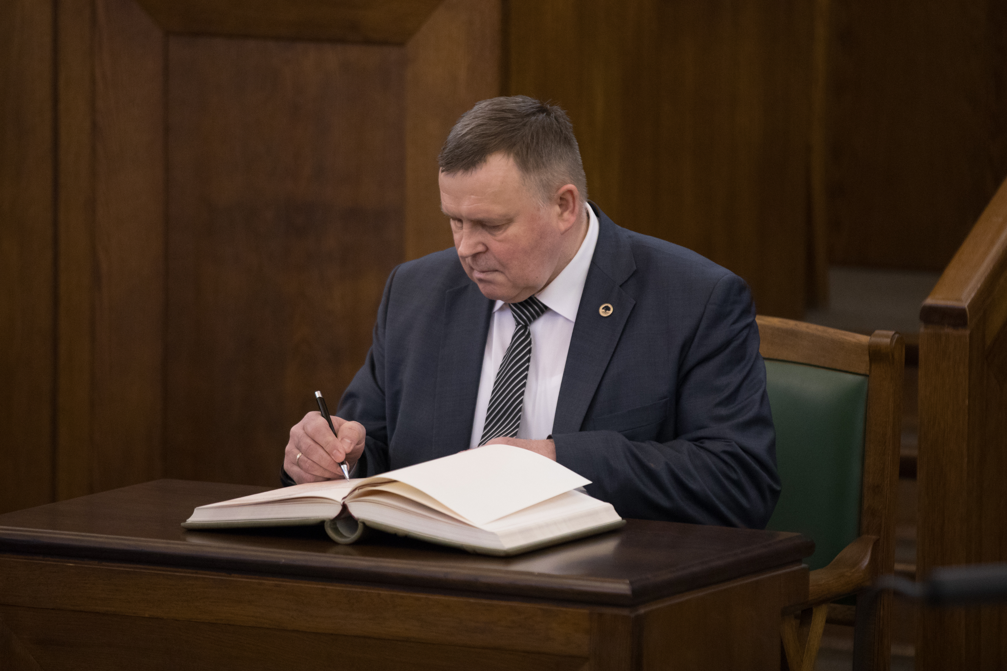 2019.gada 31.janvāris. Saeimas 24.janvāra kārtējās sēdes turpinājums. Foto: Ernests Dinka, Saeima Izmantošanas noteikumi: saeima.lv/lv/autortiesibas